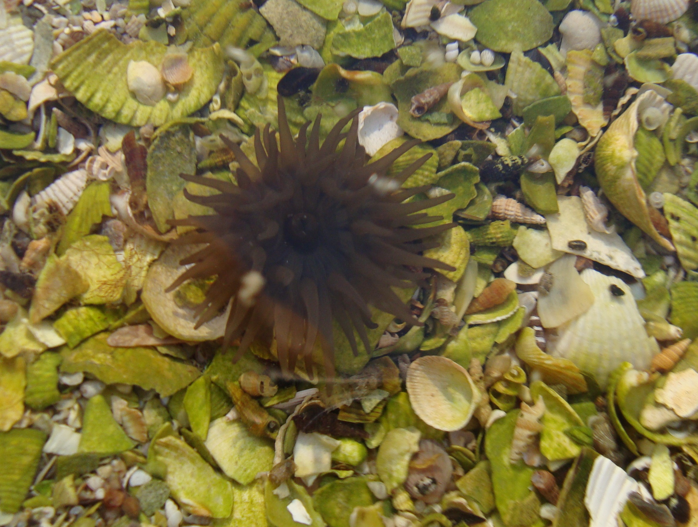 «Кінбурнська коса», Очаківський р-н